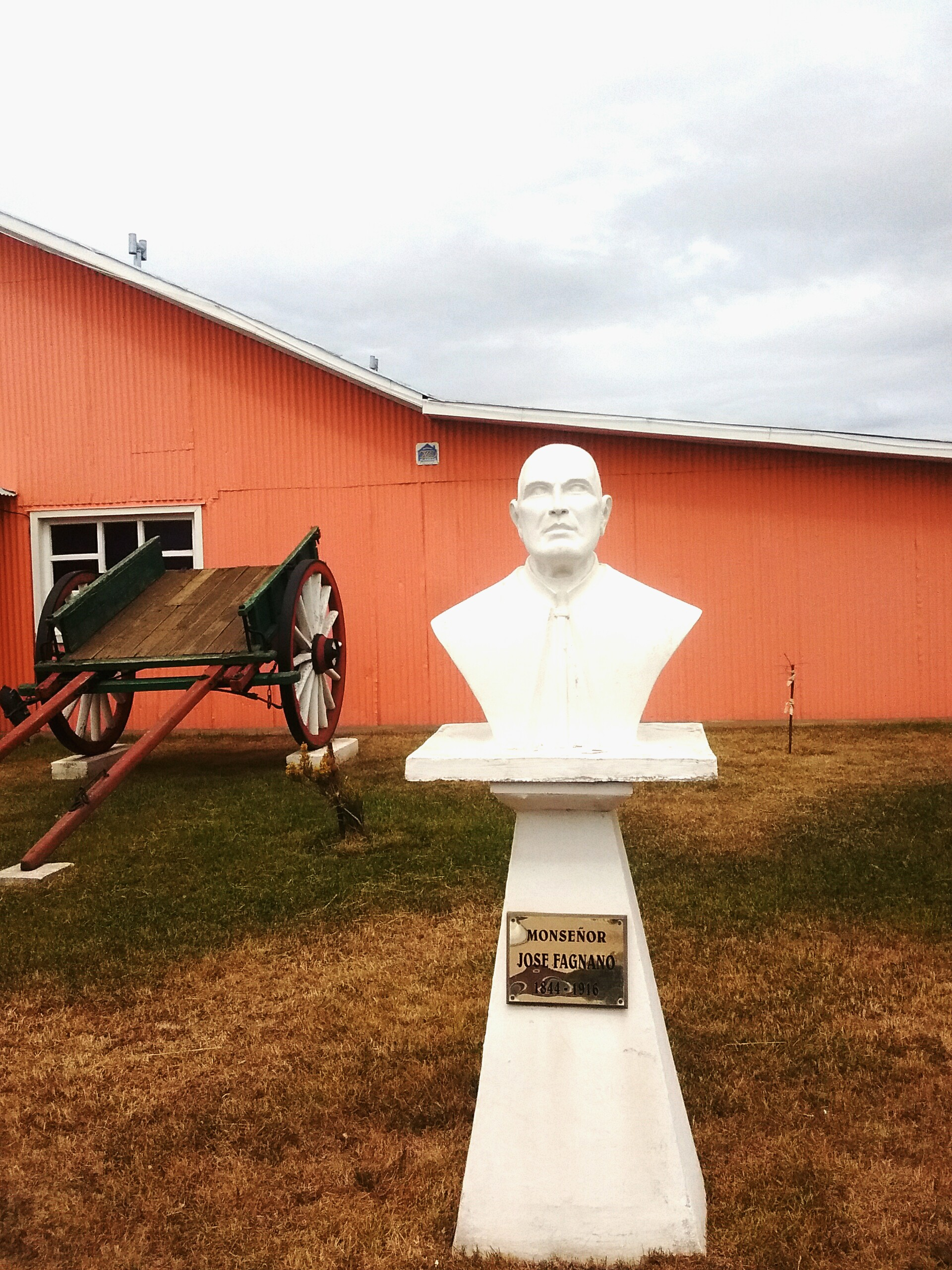 Monumento a Fagnano en el ingreso al Museo